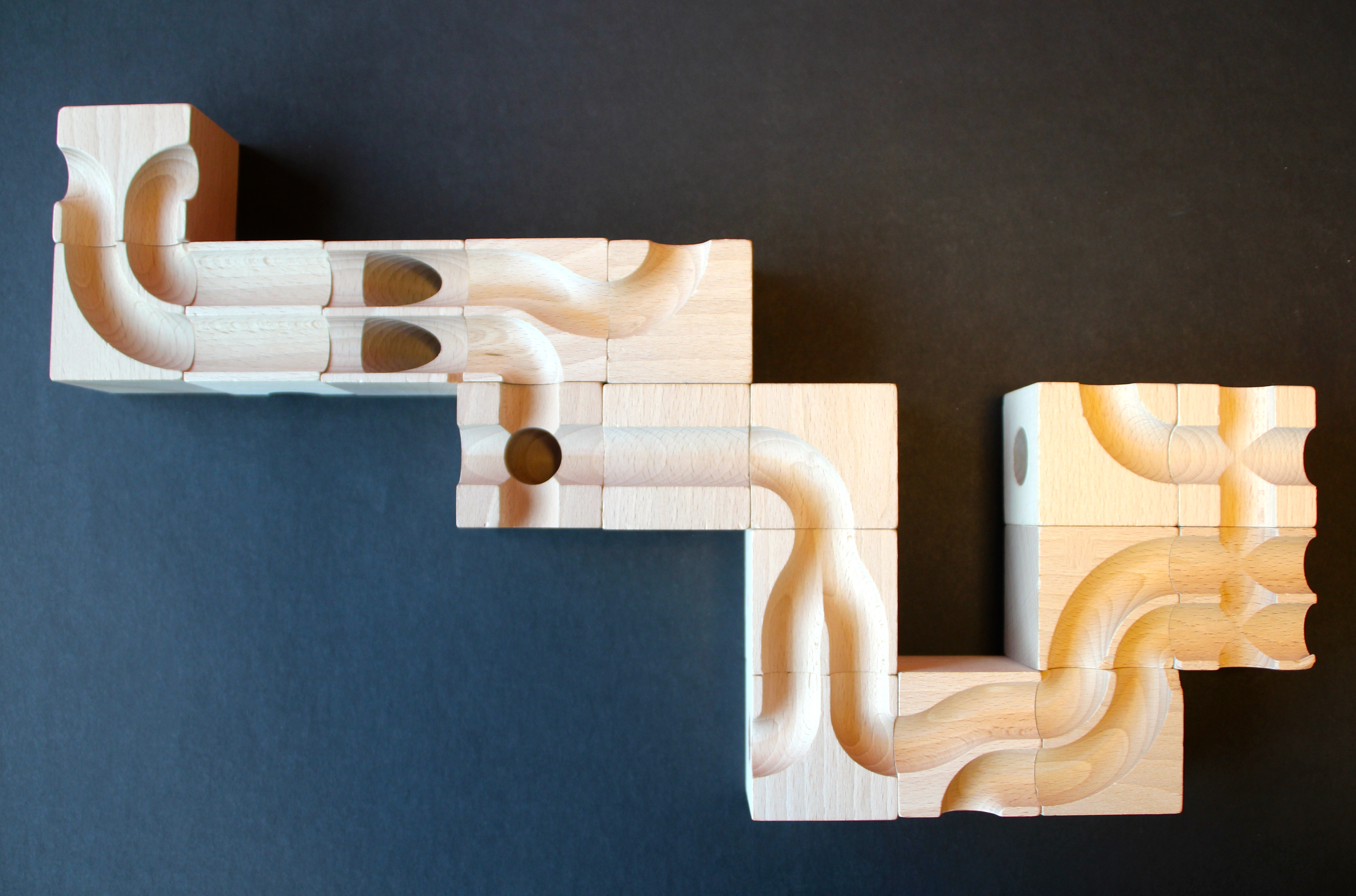 Cuboro kombinierte Elemente